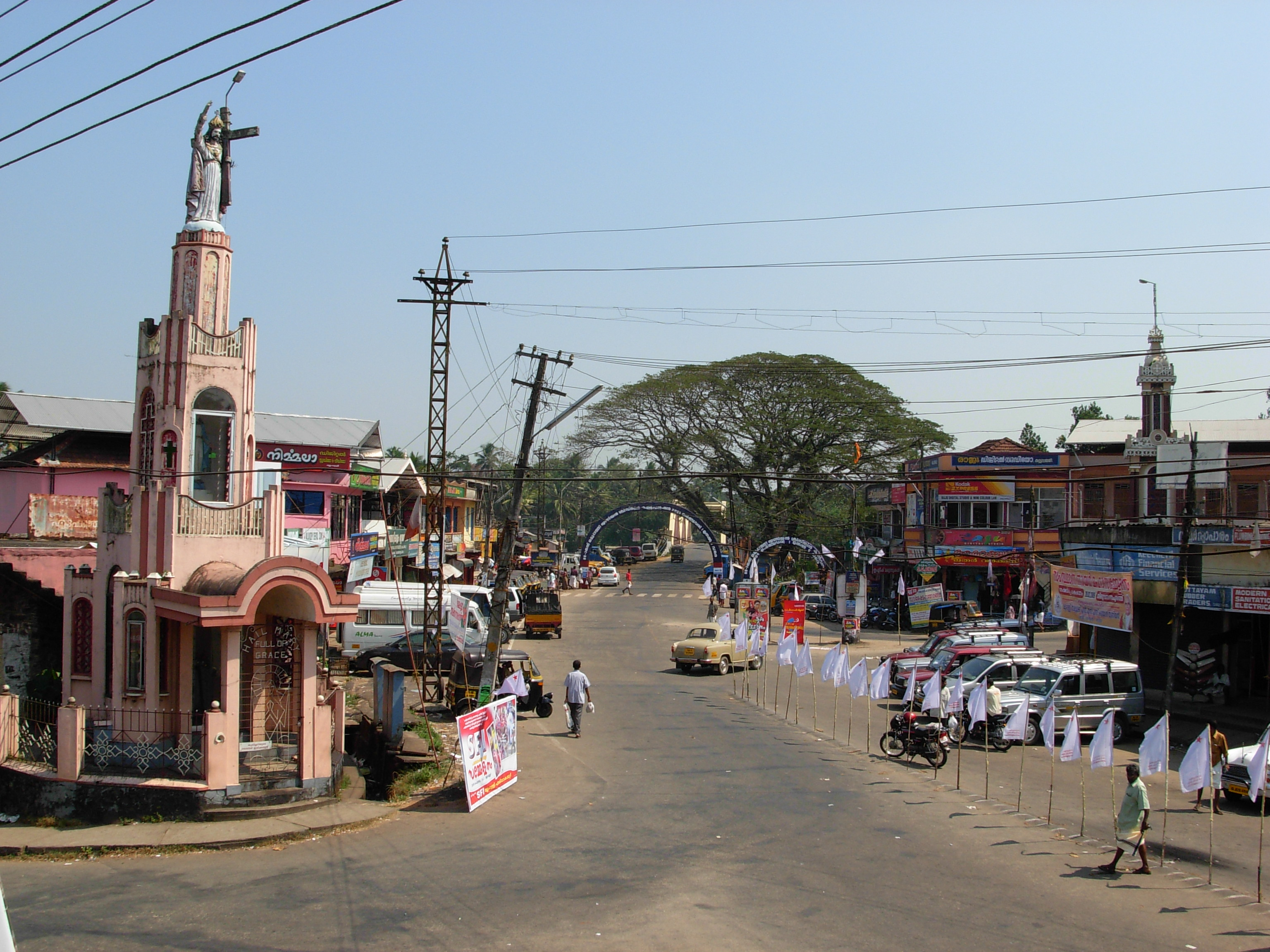 മല്ലപ്പള്ളി ഠൗൺ